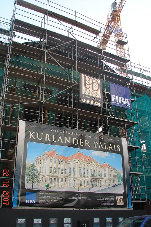 Kurländer Palais Dresden, eingerüstet